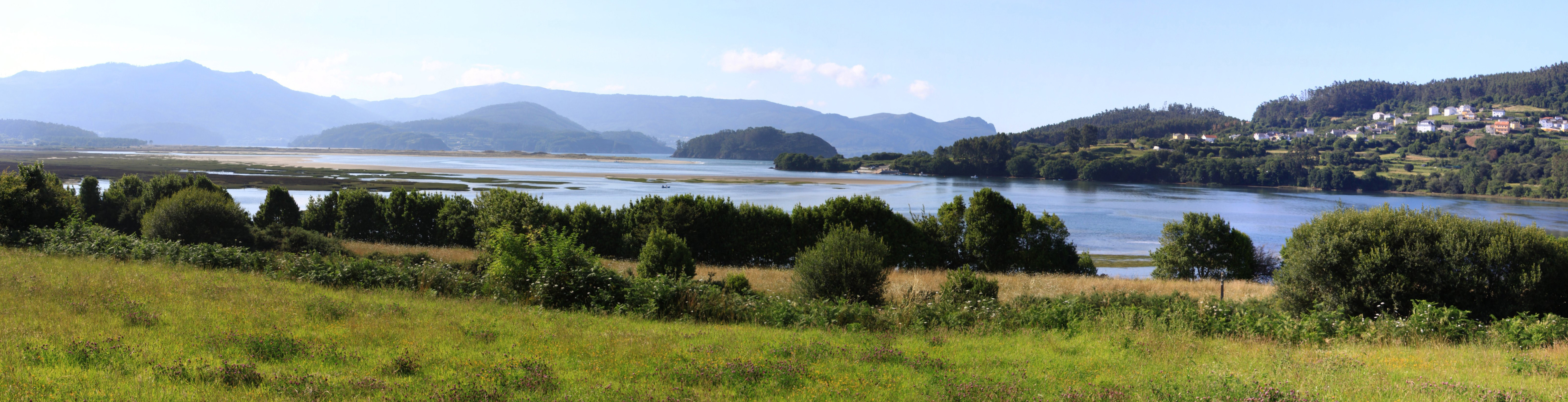 Ría de Ortigueira, Galiza Este espacio se sitúa entre los municipios de Cariño y Ortigueira, en La Coruña. Se trata de una ría amplia, limitada por las sierras de Capelada y de Faladoira. El paisaje que se observa es de un relieve abrupto, por los continuos acantilados existentes, entre los que resalta el Cabo Ortegal. Al encontrarse distintos ecosistemas, tanto la vegetación como la fauna, son de gran riqueza. Entre la vegetación, lo más llamativo, son las amplias junqueras de las desembocaduras de los ríos. También se encuentran pastizales salinos, y en las dunas, la vegetación propia de este tipo de ambiente. En cuanto a la fauna, destaca el grupo de las aves, que encuentran en este humedal un sitio idóneo para su reproducción o para su invernada; esto convierte al lugar en un interesante observatorio ornitológico. Esta importancia en cuanto a la avifauna, ha hecho que el lugar sea declarado Zona de Especial Protección para las Aves. Aparte de las aves, cabe destacar la existencia de la nutria. Hay que destacar que el lugar está también incluido en la lista de humedales del convenio RAMSAR.